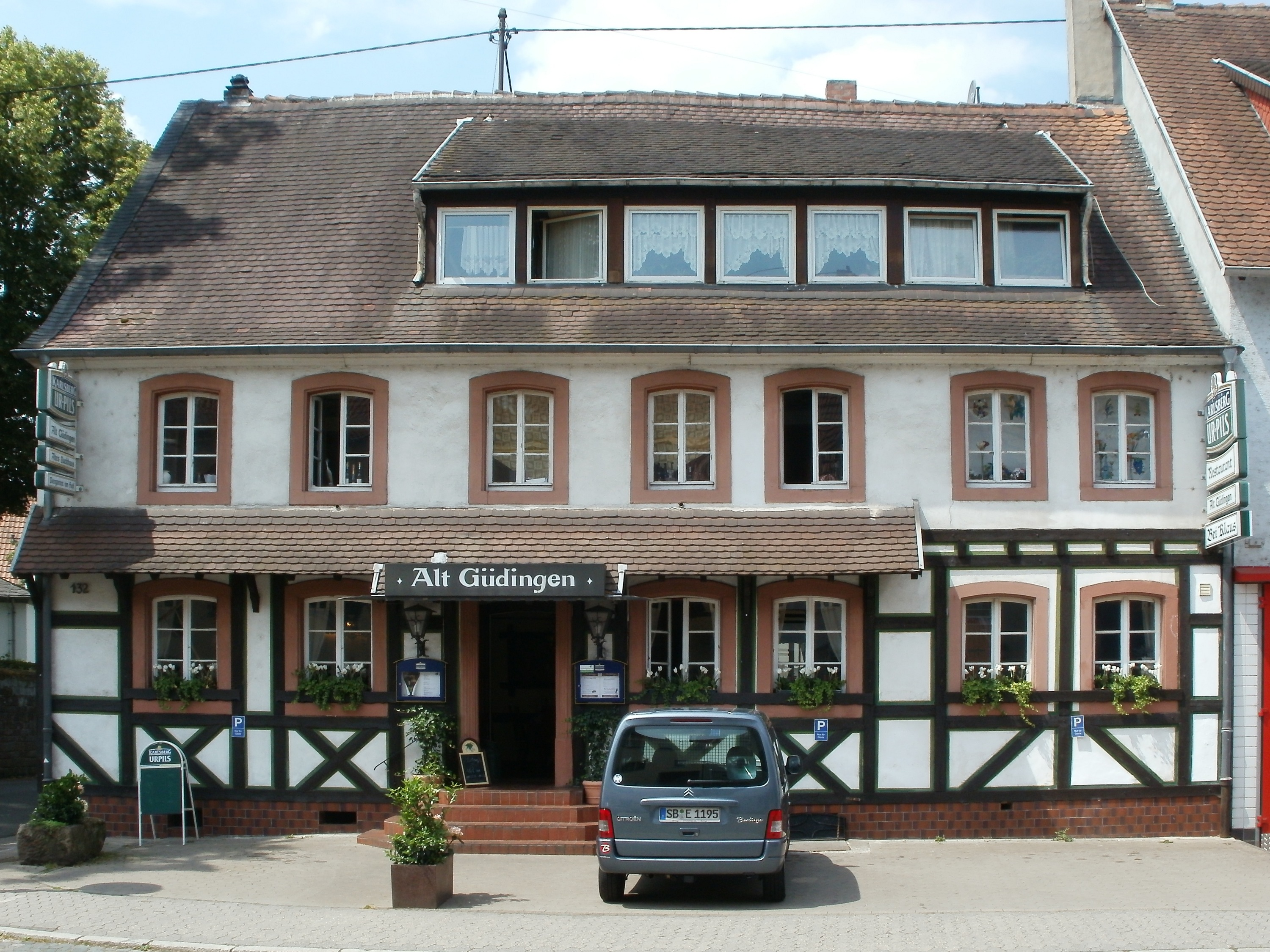 Saargemünder Straße 132 (Güdingen)